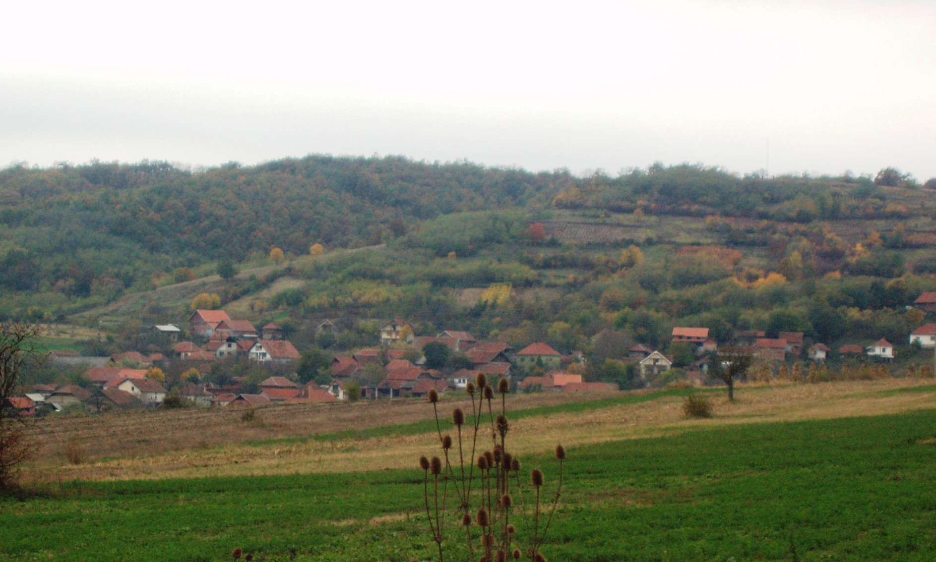 Чубура (Ражањ)